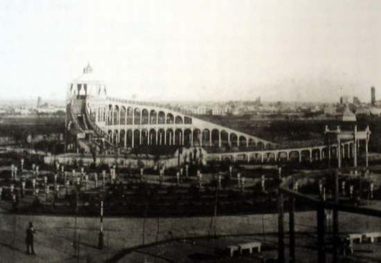 Camps Elisis de Barcelona, parc d'atraccions situat vora l'actual Passeig de Gràcia, entre els carrers d'Aragó i Rosselló. Van funcionar entre 1860 i 1876.